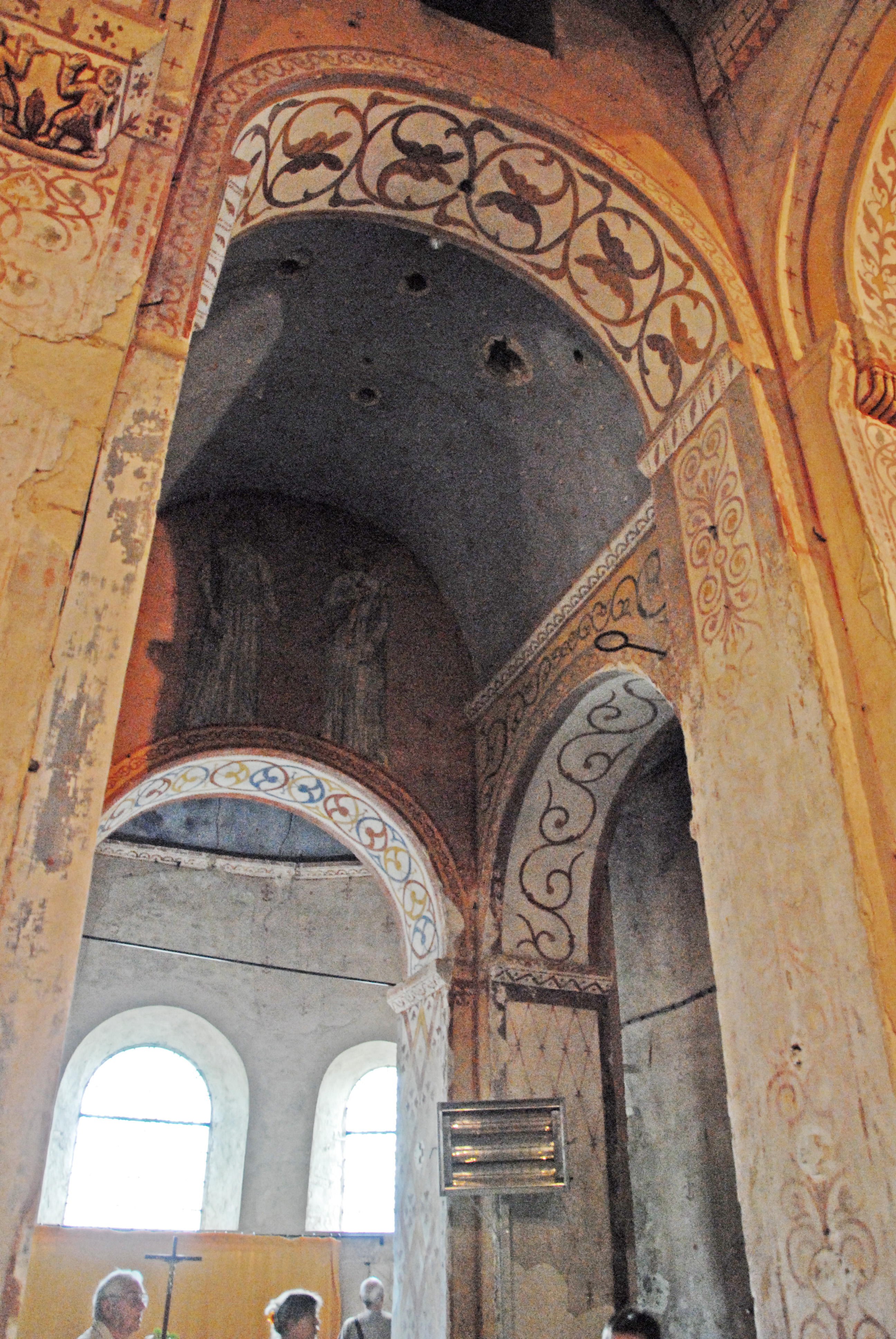 Civaux, Kirche, Chor und "Vierung"